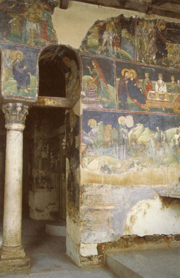 Fresken der Nordwand im Südabschnitt des Umgangs der Kirche Hagia Nikolaos Orfanos in Thessaloniki, 1310-20